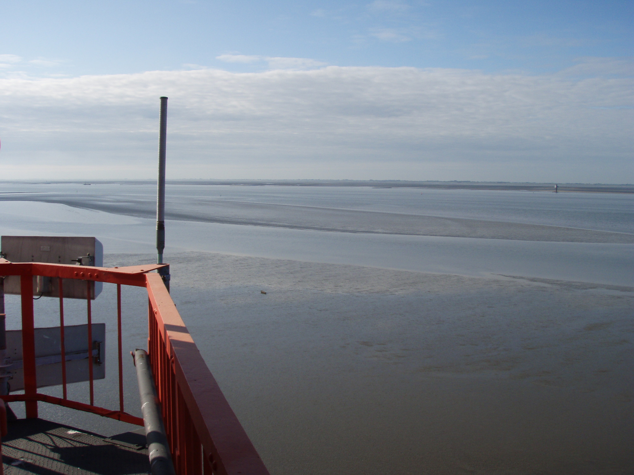 Außenweser beim Leuchtturm Robbenplate